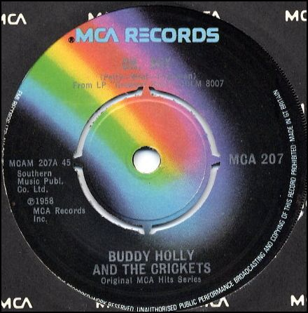 Foto del sencillo "Oh Boy" de Buddy Holly, por la MCA Records, este sencillo llegó al n.1